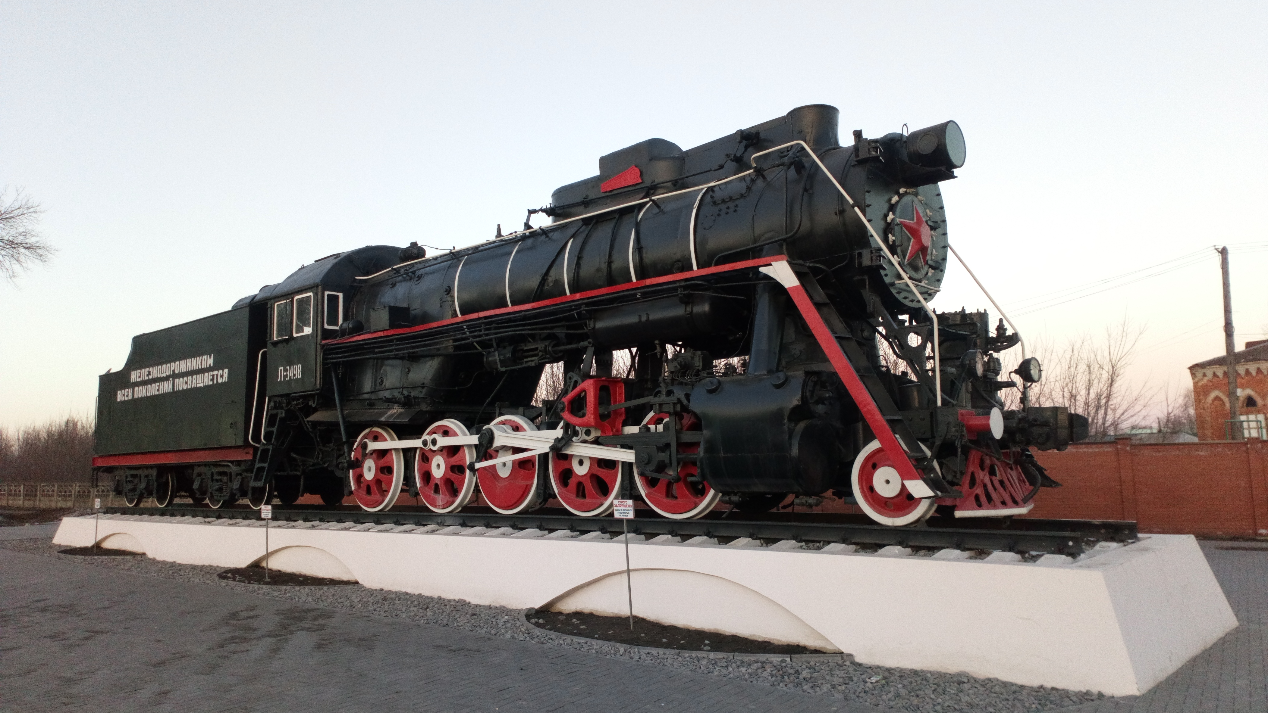 Паровоз Л-3498 в городе Сасово в составе мемориала Славы железнодорожникам всех поколений